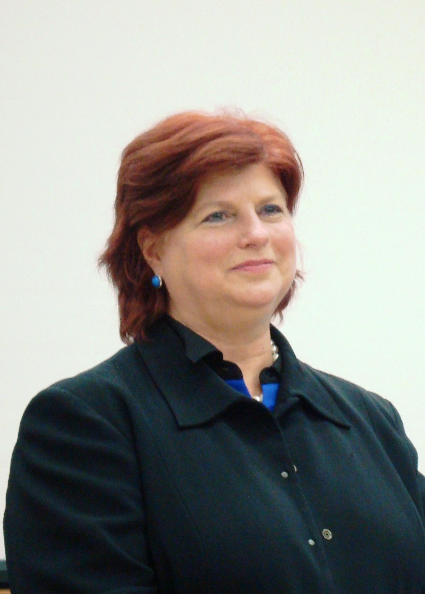 La députée de Pointe-aux-Trembles, Nicole Léger, et le député de Saint-Jérôme, Pierre Karl Péladeau